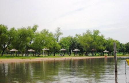 Lago Ypacarai desde la Playa de Aregua, Paraguay